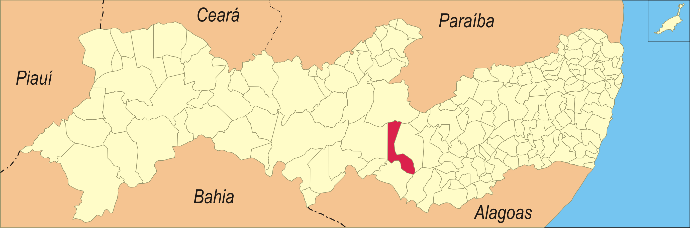 Localização da cidade em Pernambuco.